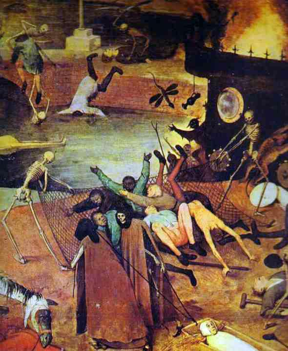 detail 5